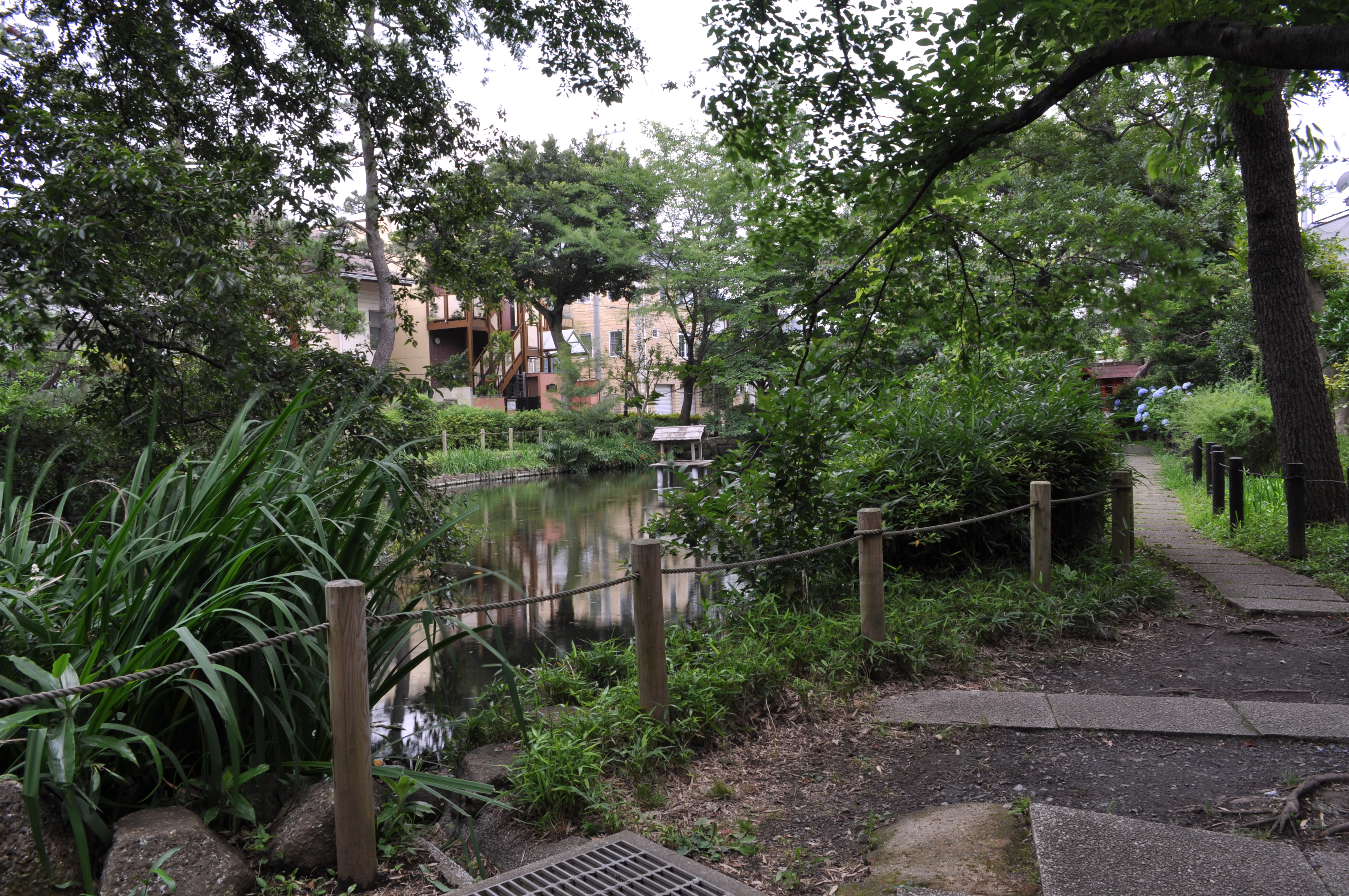 つりがね池公園